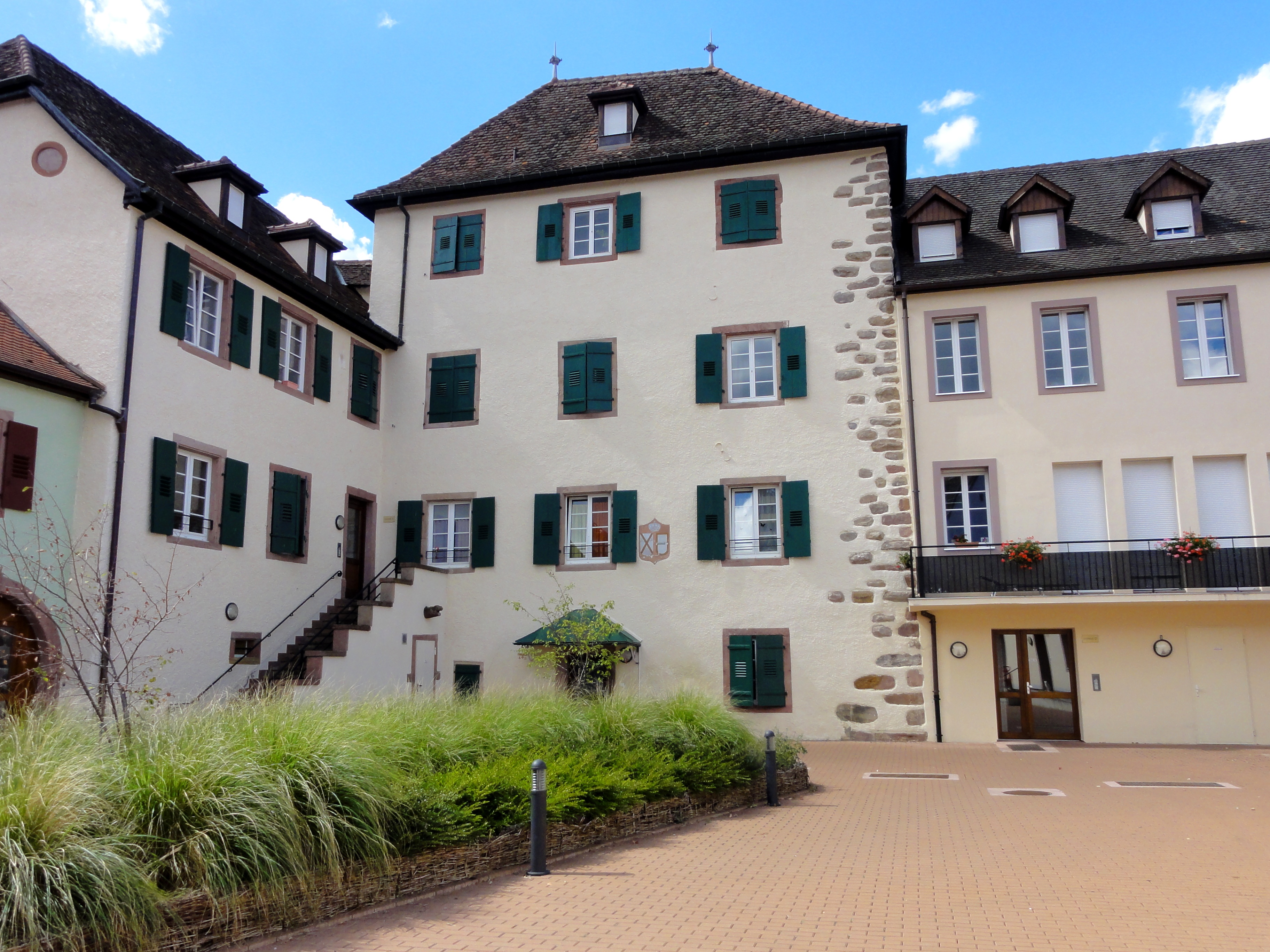 Alsace, Haut-Rhin, Soultzbach-les-Bains, Château des Hattstatt-Schauenburg (XVIe-XVIIe-XVIIIe), aujourd'hui immeuble de logements, 30 rue du Rempart. It is indexed in the Base Mérimée, a database of architectural heritage maintained by the French Ministry of Culture, under the references PA68000056 and IA68001374.